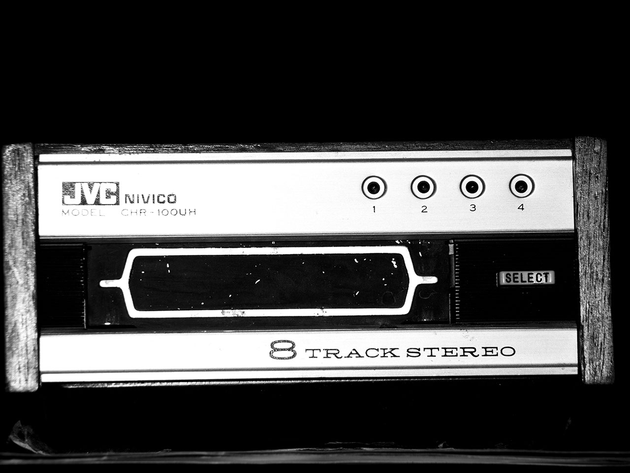 Leitor de cartuchos JVC